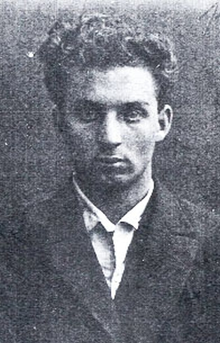 Leon Lichtblau (pseudonim: Adolf Cristi; în rusă Адолф Иванович Кристин[1], n. 23 august 1901, București - d. 25 aprilie 1938, Moscova) a fost un comunist evreu român.